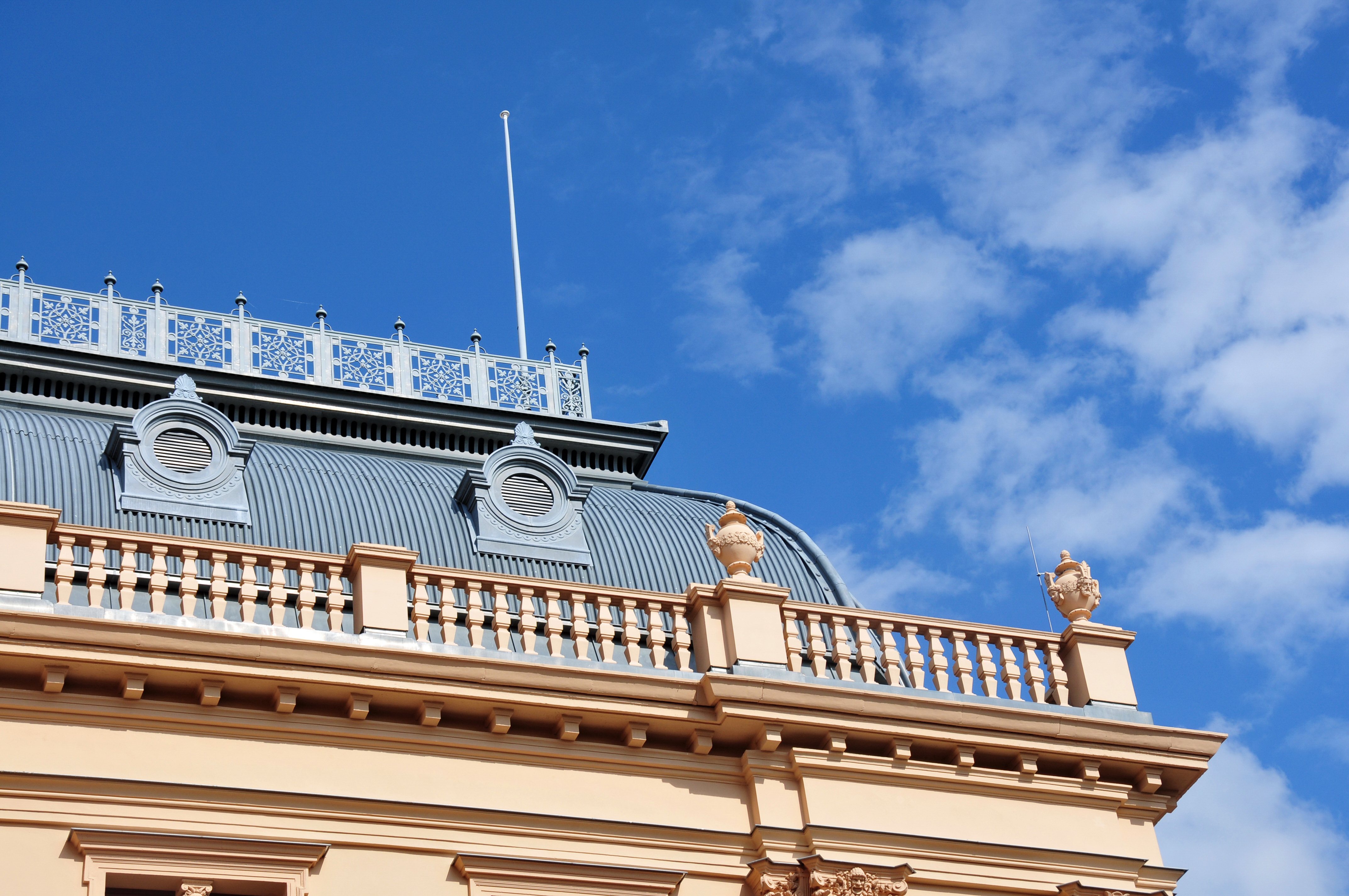 Schwerin; mit 50mm Brennweite von der Orangerie zum Bahnhof so auch hier